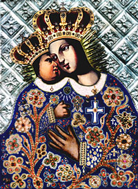 Obraz Matki Bożej Kalwaryjskiej, 80x58 cm, mal. nieznany, pocz. XVII w.